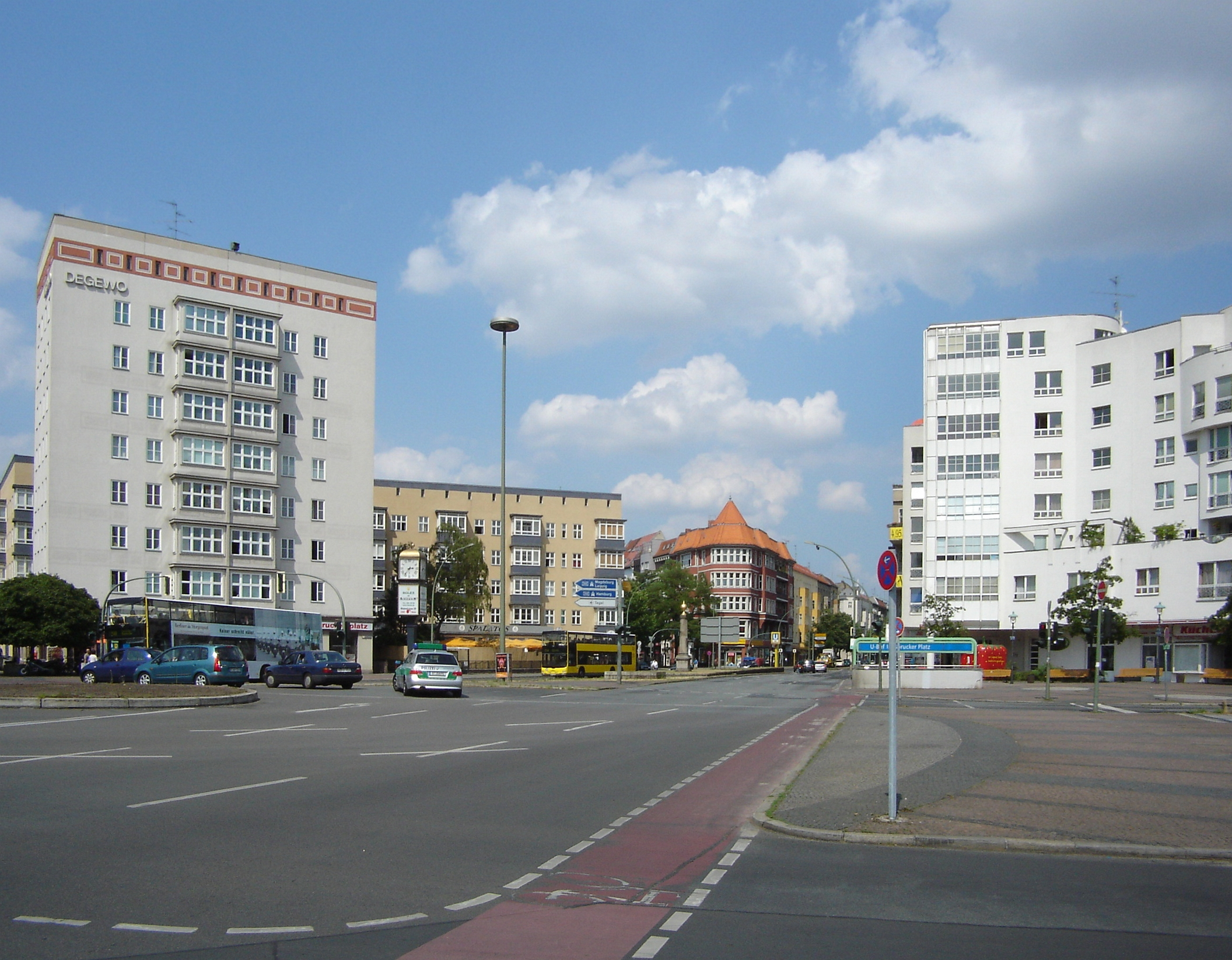 Innsbrucker Platz, Berlin-Schöneberg Source: Self-made, July 2006 Author: BishkekRocks